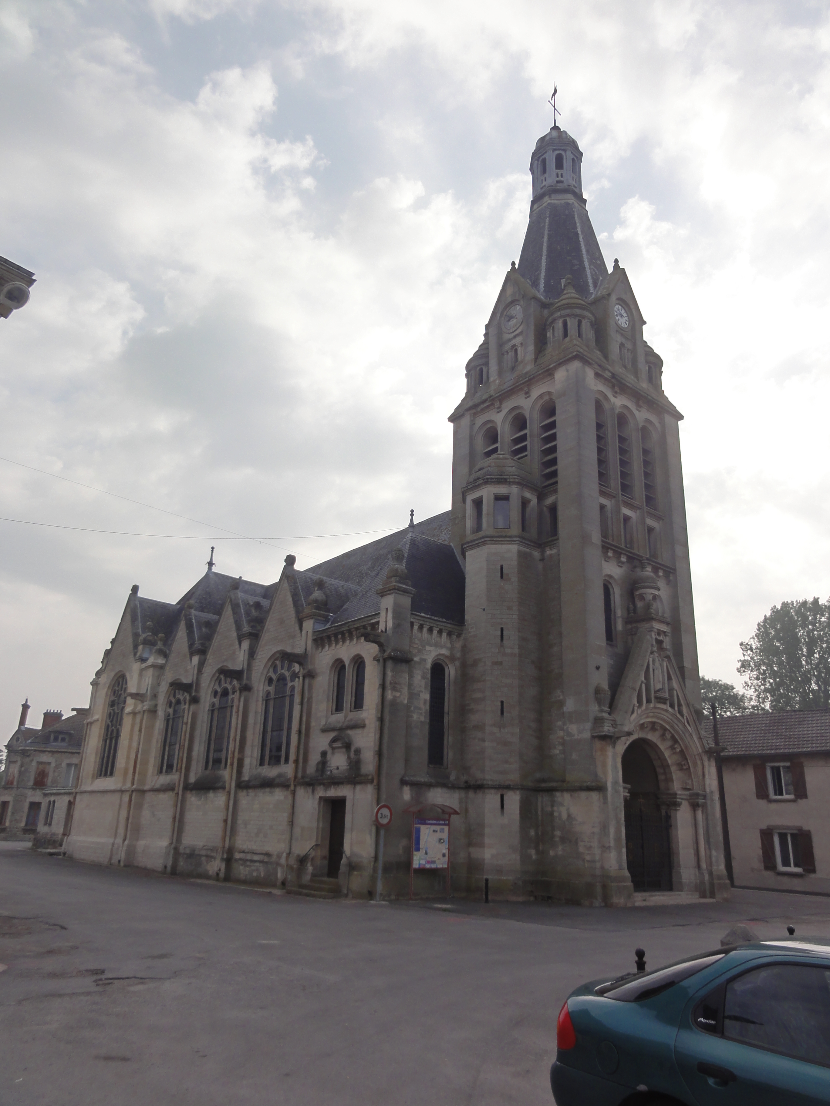 Neufchâtel-sur-Aisne (Aisne) Église